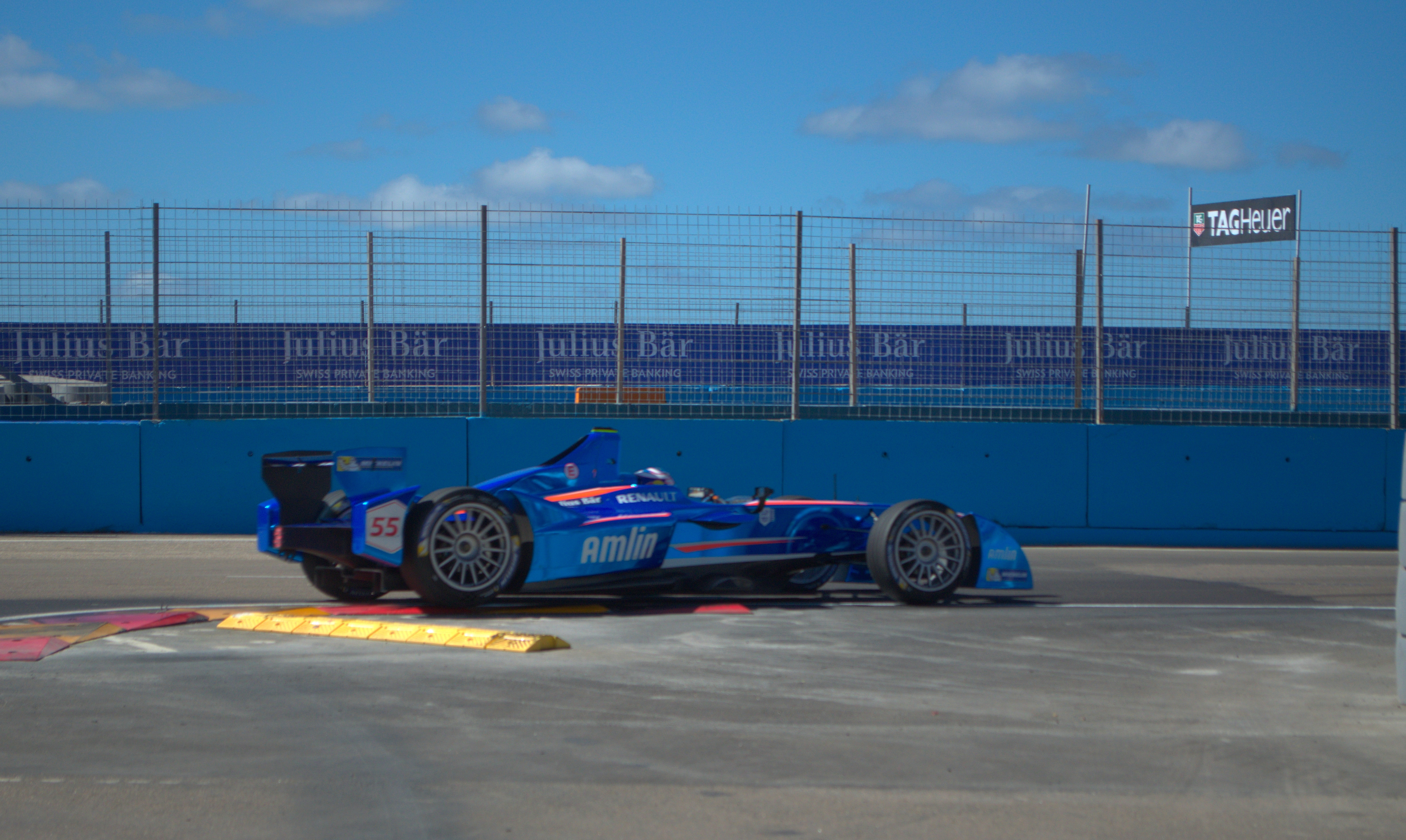 Solo se permite el uso de esta imagen mencionando a Velocidad Total como su autor. Imagen del equipo Amlin Aguri de Fórmula E, durante el Punta del Este ePrix de 2014.